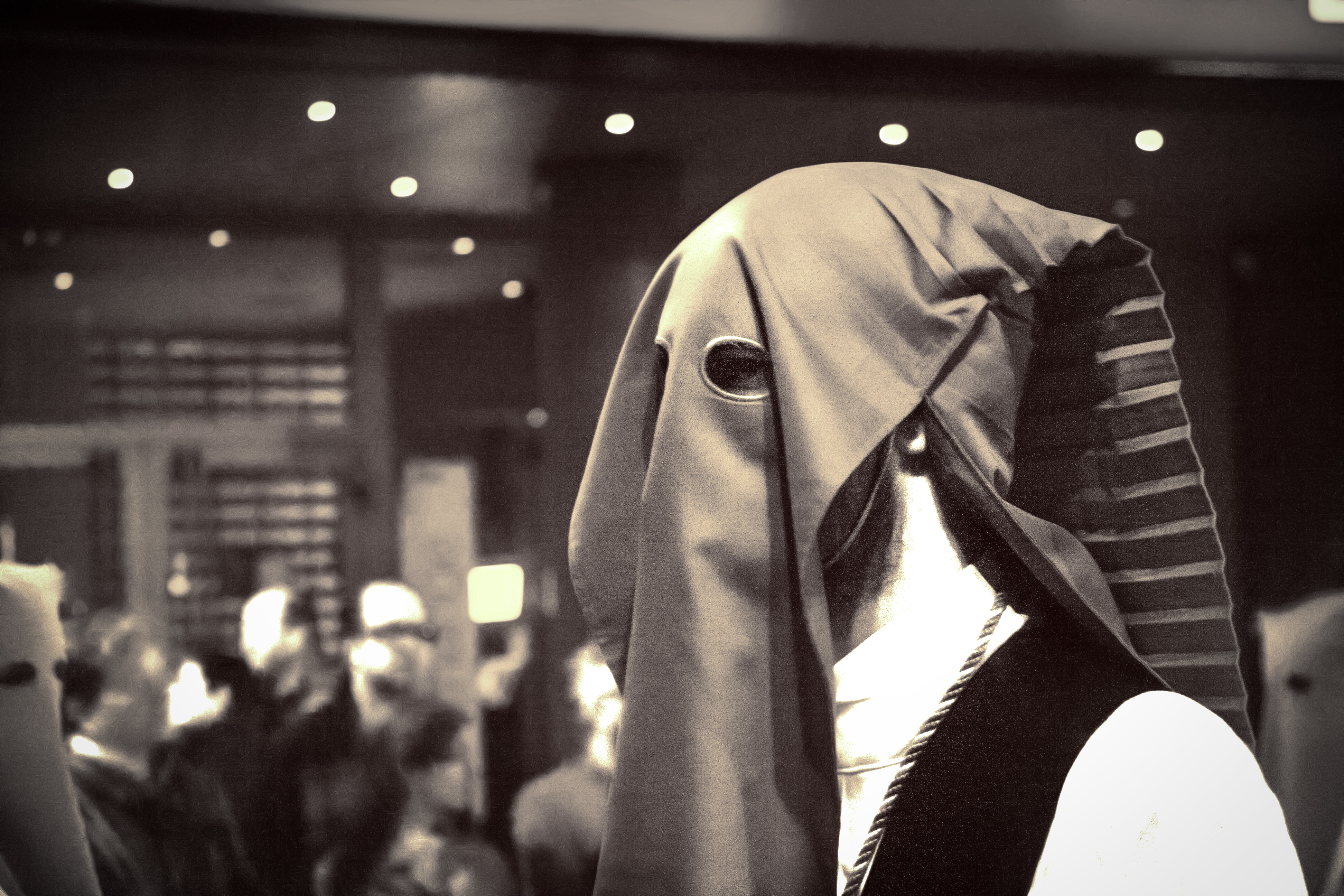 Zaragoza, España